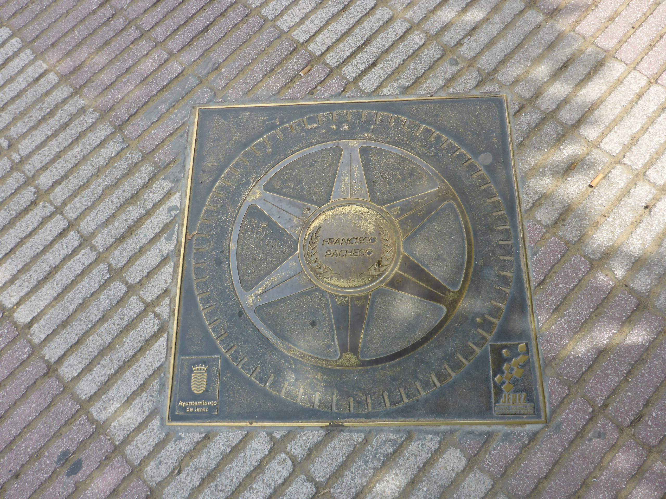 Paseo de la Fama de Jerez - Estrella de Francisco Pachecho